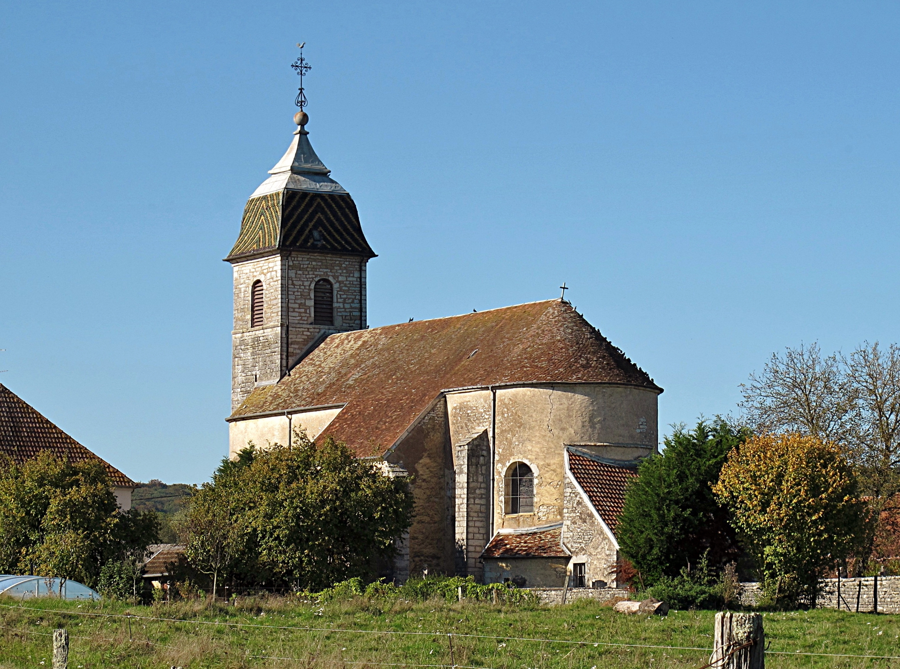 L'église de Brussey